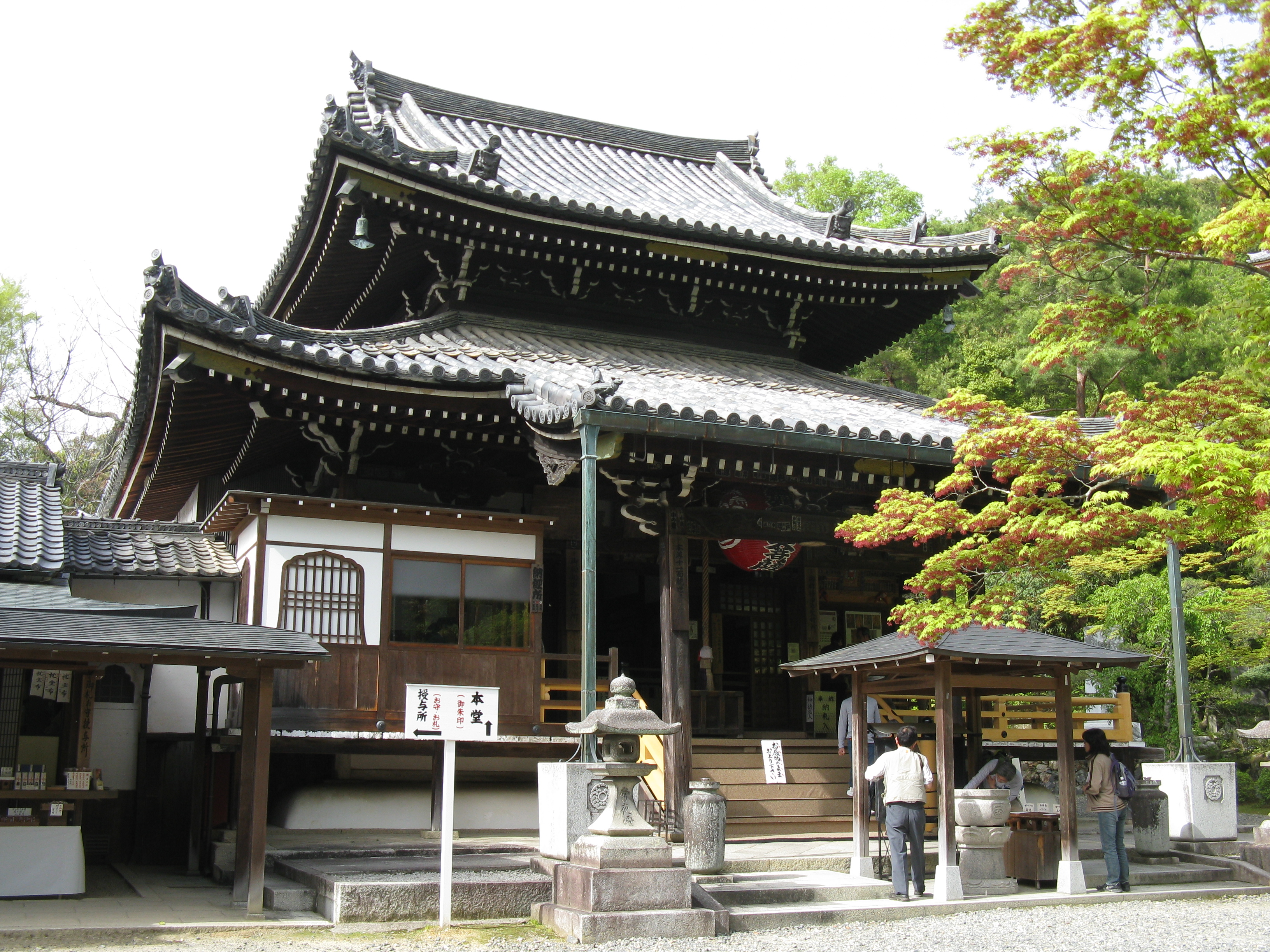 観音寺（今熊野観音寺）本堂